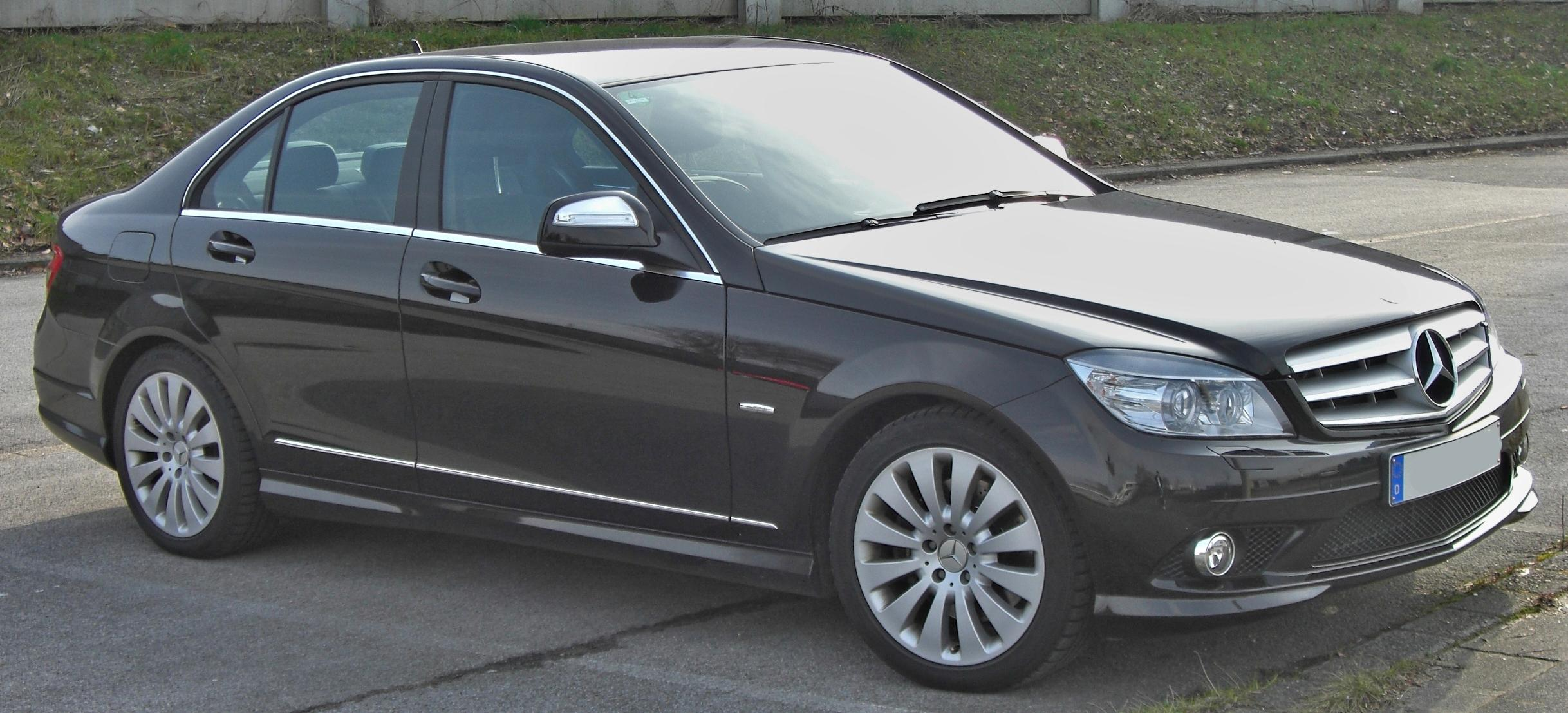 Mercedes C-Klasse